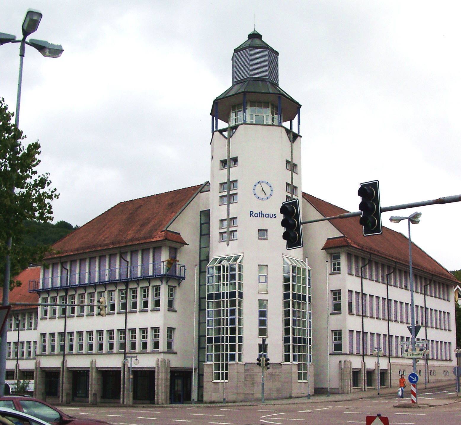 Künzelsau, Neues Rathaus